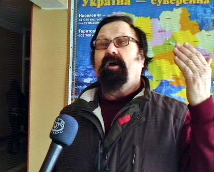 режиссер